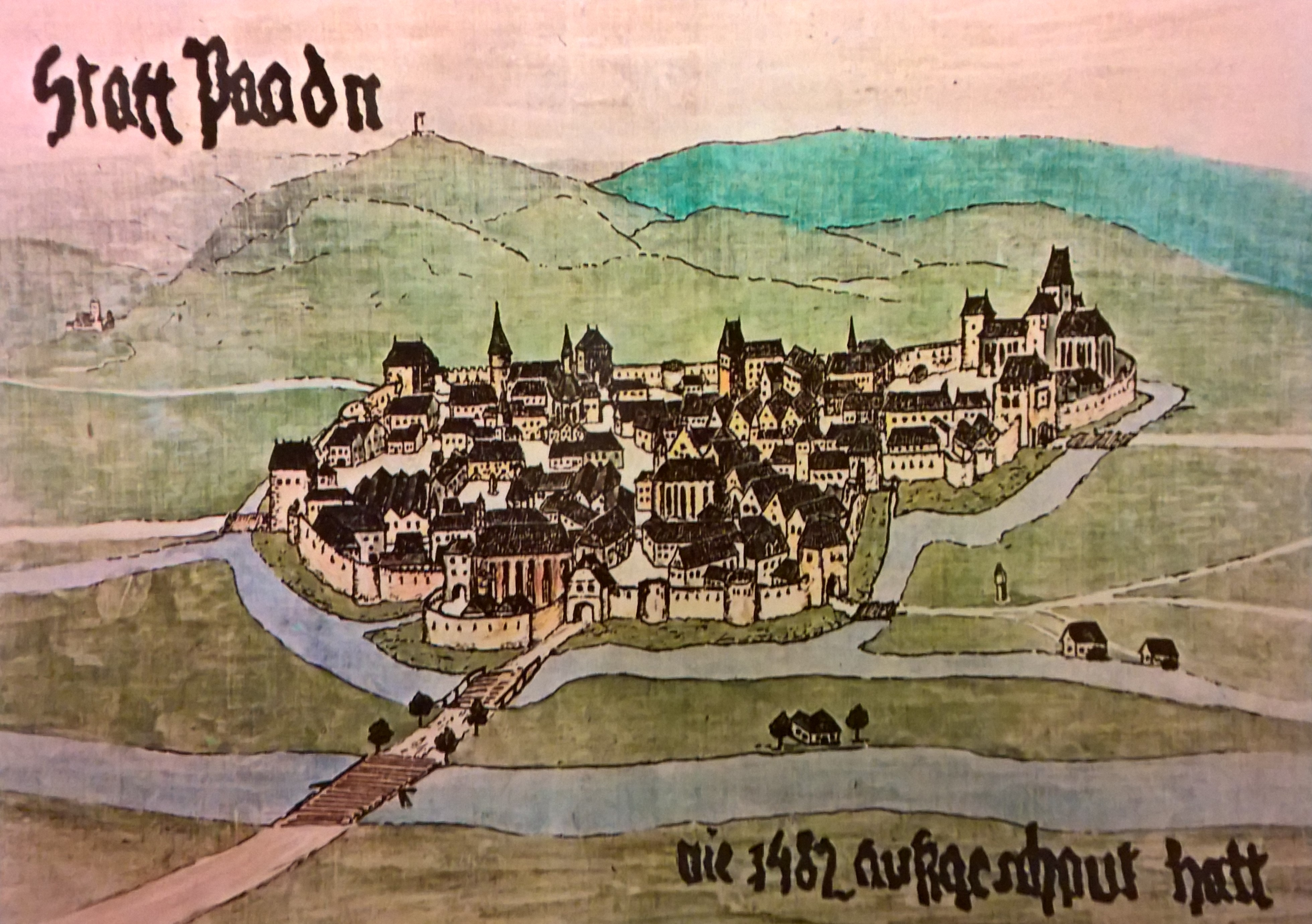 Zeitgenössische Darstellung der Stadt Baden im Jahr 1482